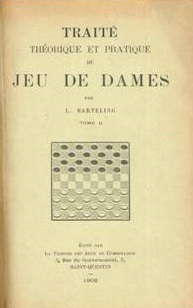 Обложка книги Луи Бартелинга 1902 года